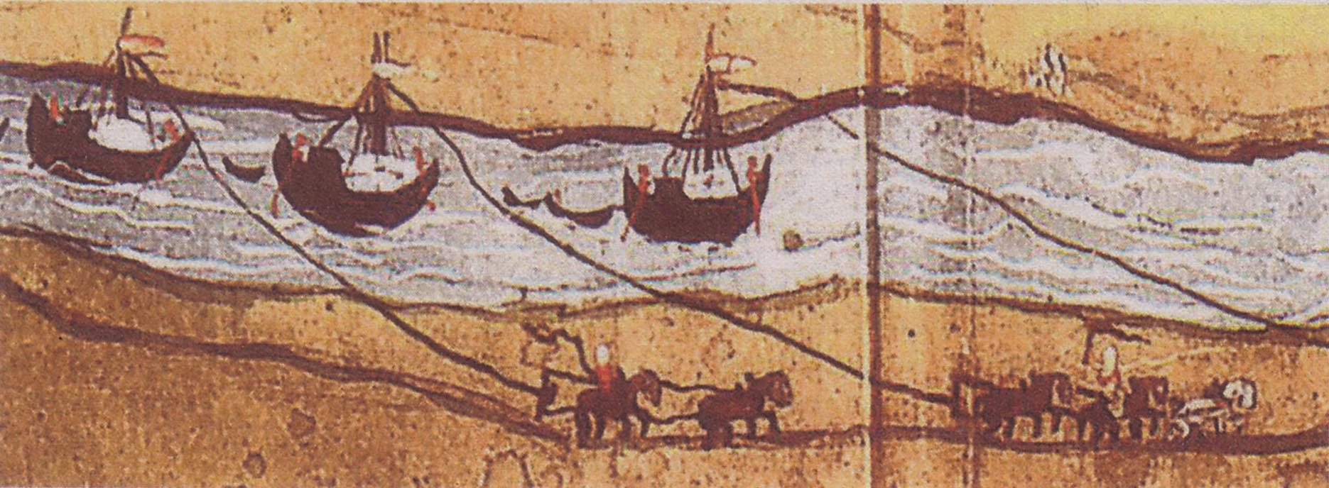 Ausschnitt aus der Mainlaufkarte. Zu erkennen sind die flussaufwärts gezogenen Schiffe.